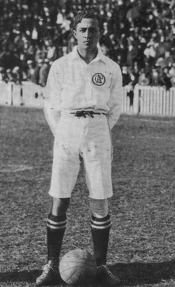 Arthur Friedenreich (CA Paulistano), 1921